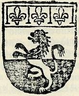 Stemma della famiglia Zani